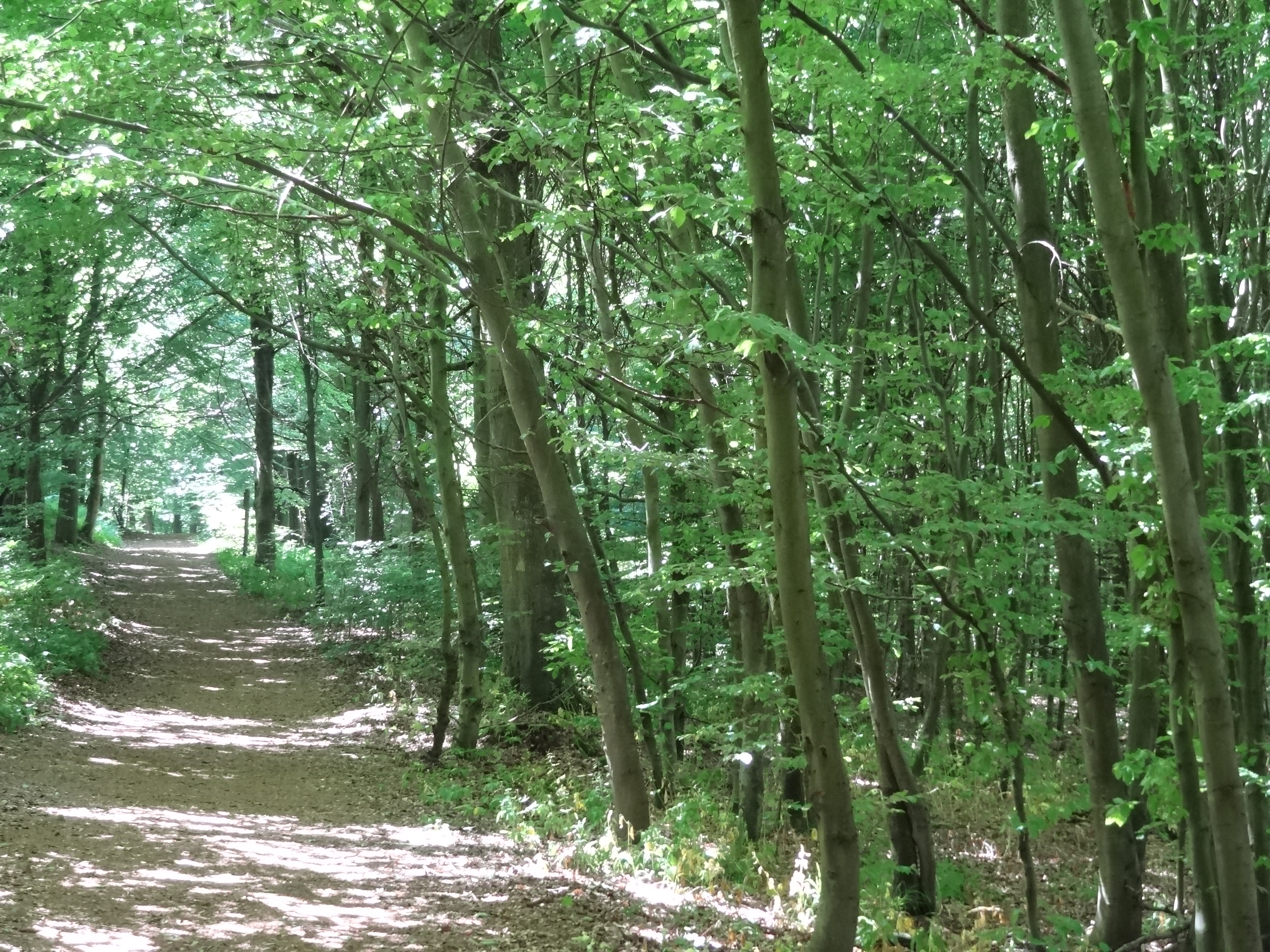 Grünes Meer